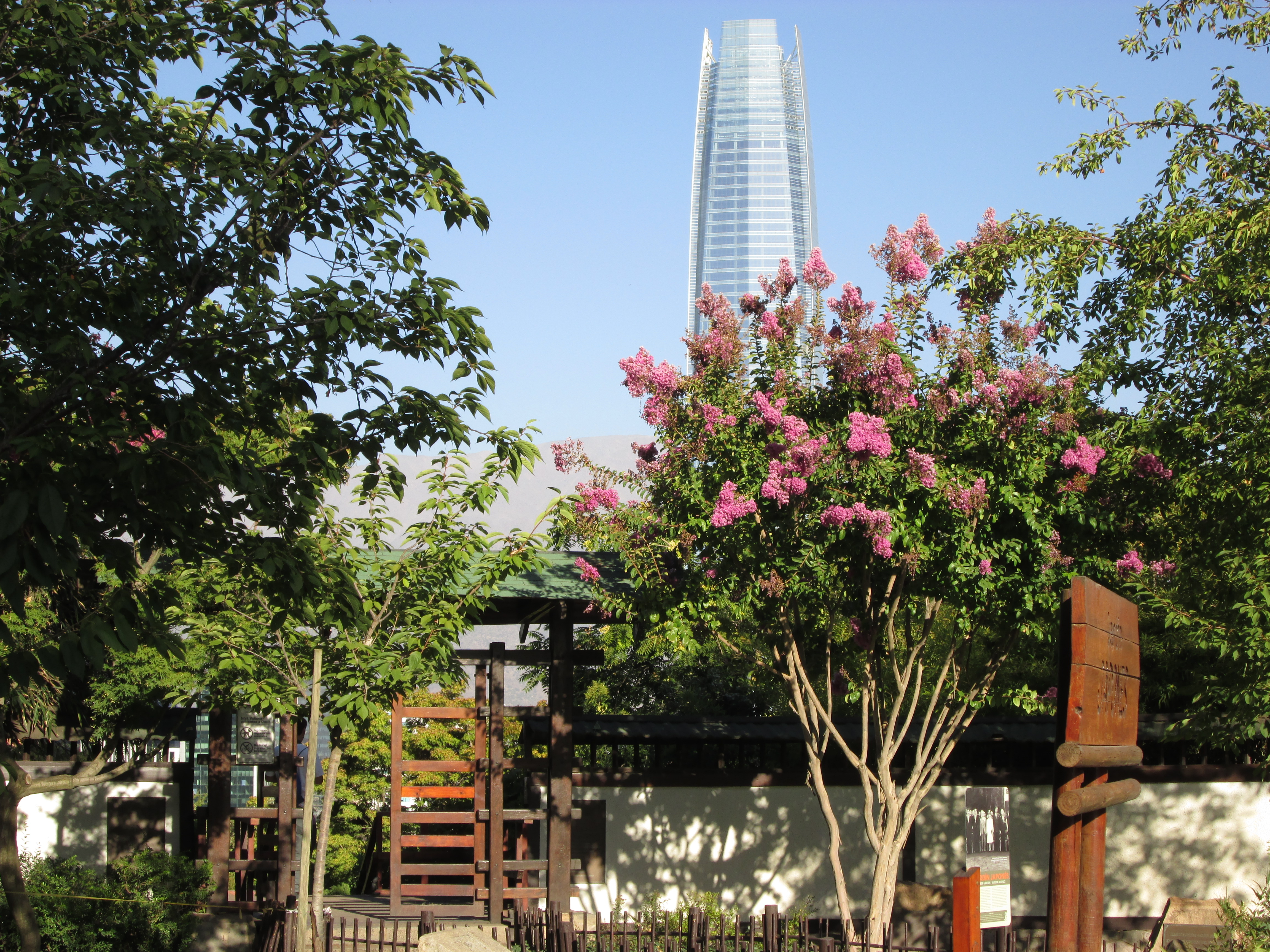 Frontis del Jardín Japonés del Parque Metropolitano de Santiago